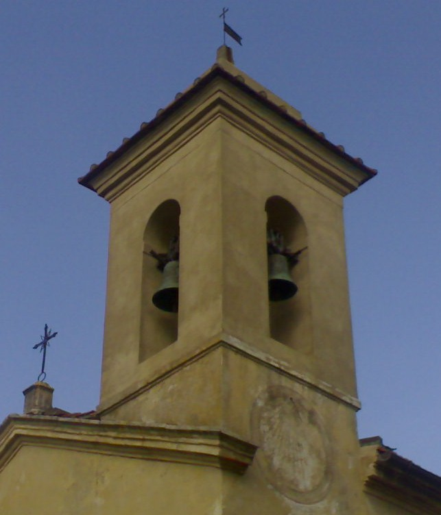 Esterno laterale Chiesa di San Giovanni Battista Farnetella (Siena)